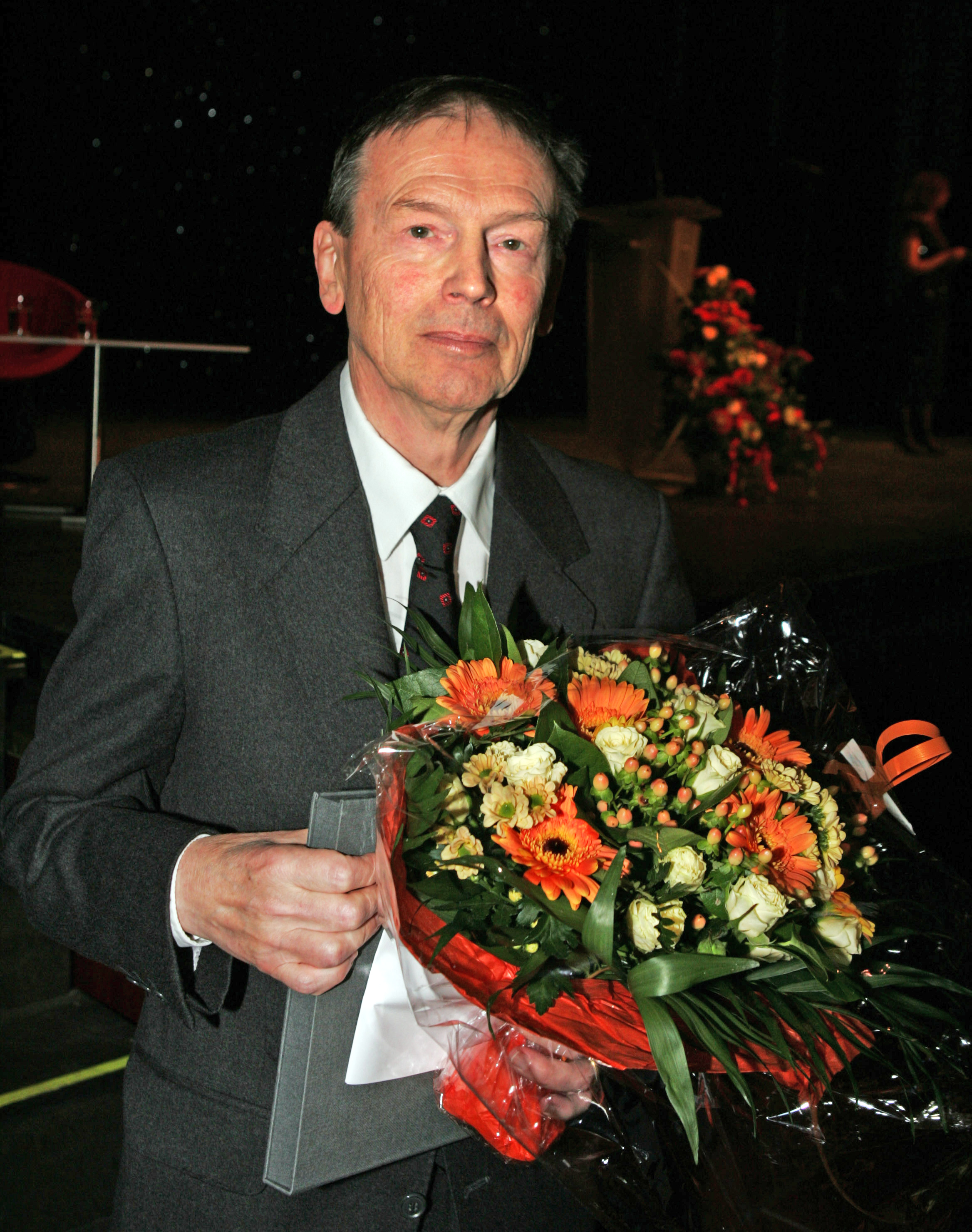 Göran Sonnevi, vinnare av Nordiska rådets litteraturpris 2006.